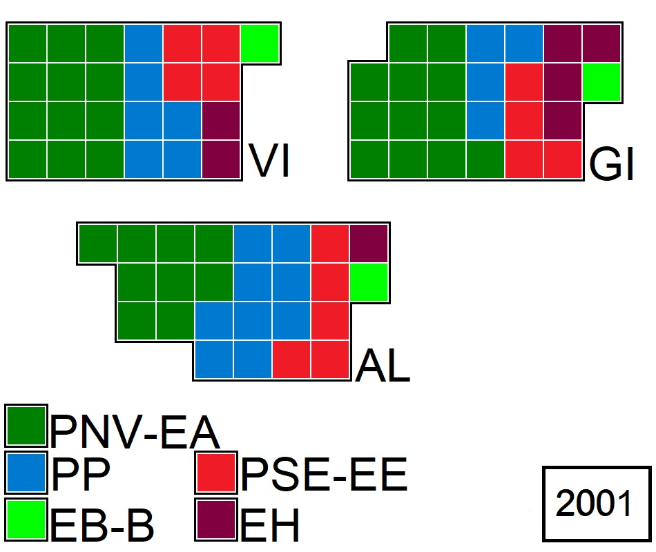 PAÍS VASCO 2001 JPEG